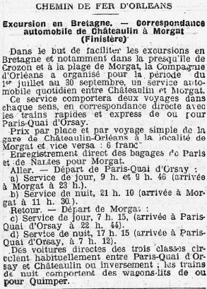 Publicité des Chemins de fer d'Orléans à propos des liaisons ferroviaires entre Paris et Châteaulin à destination de la plage de Morgat